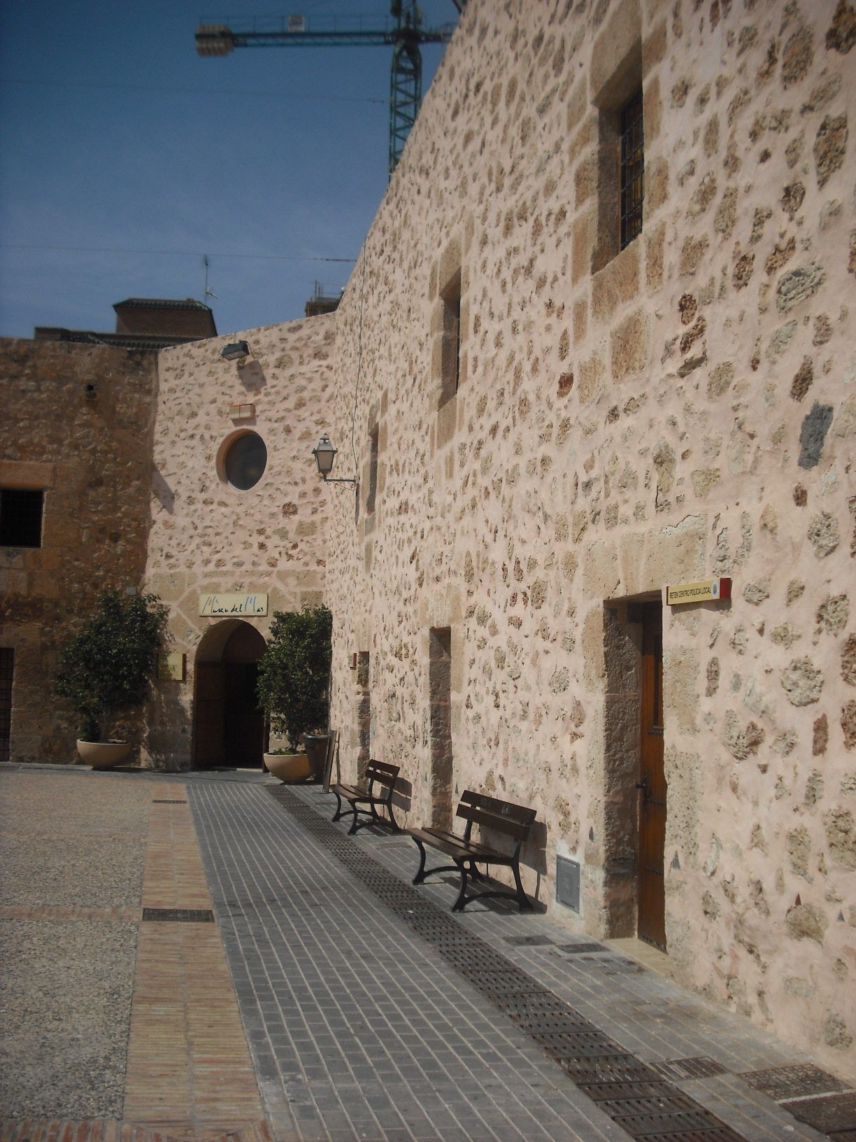 Entrada del Museu del Mar, al castell de Santa Pola.